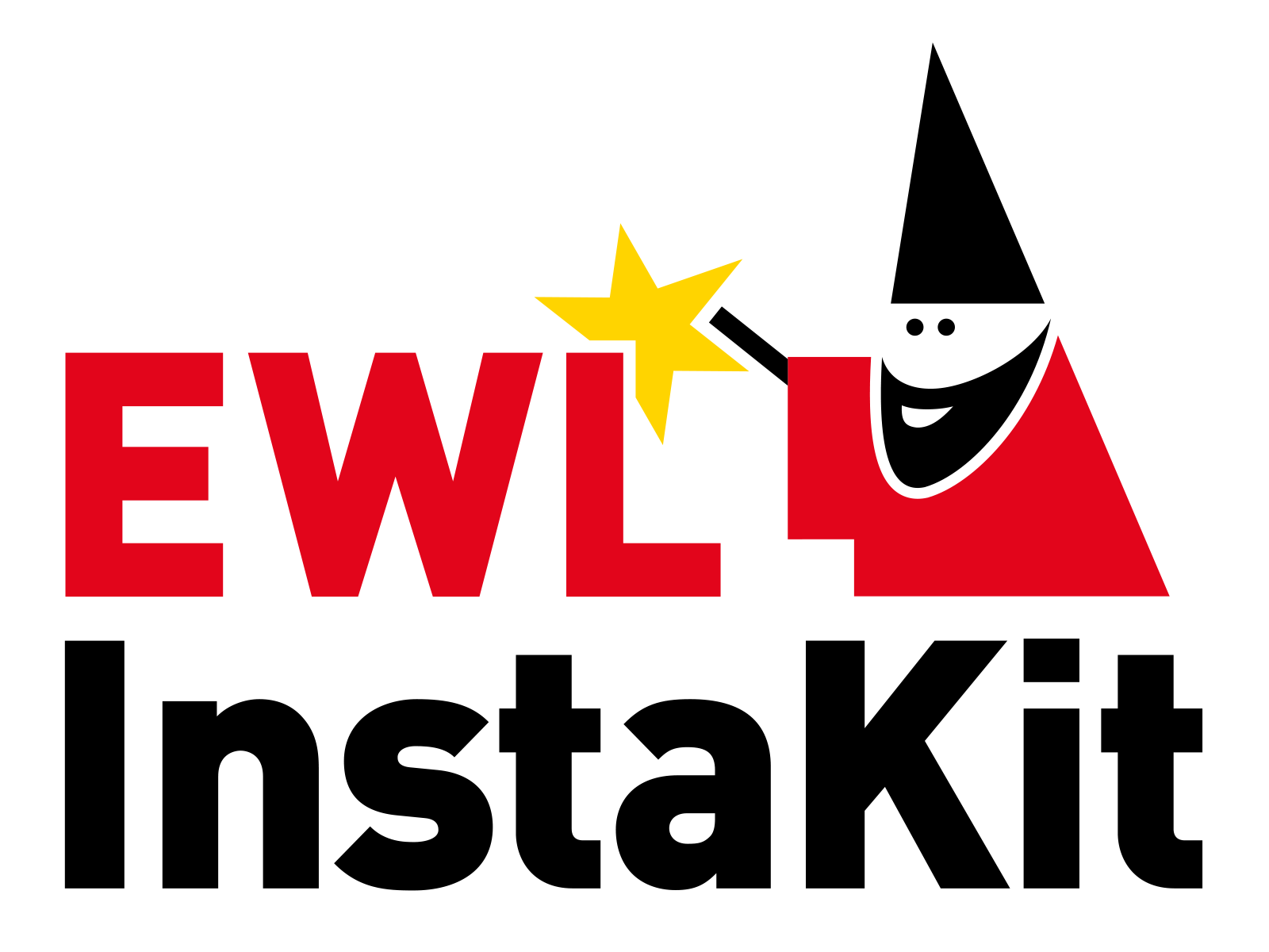 Logo EWL InstaKit